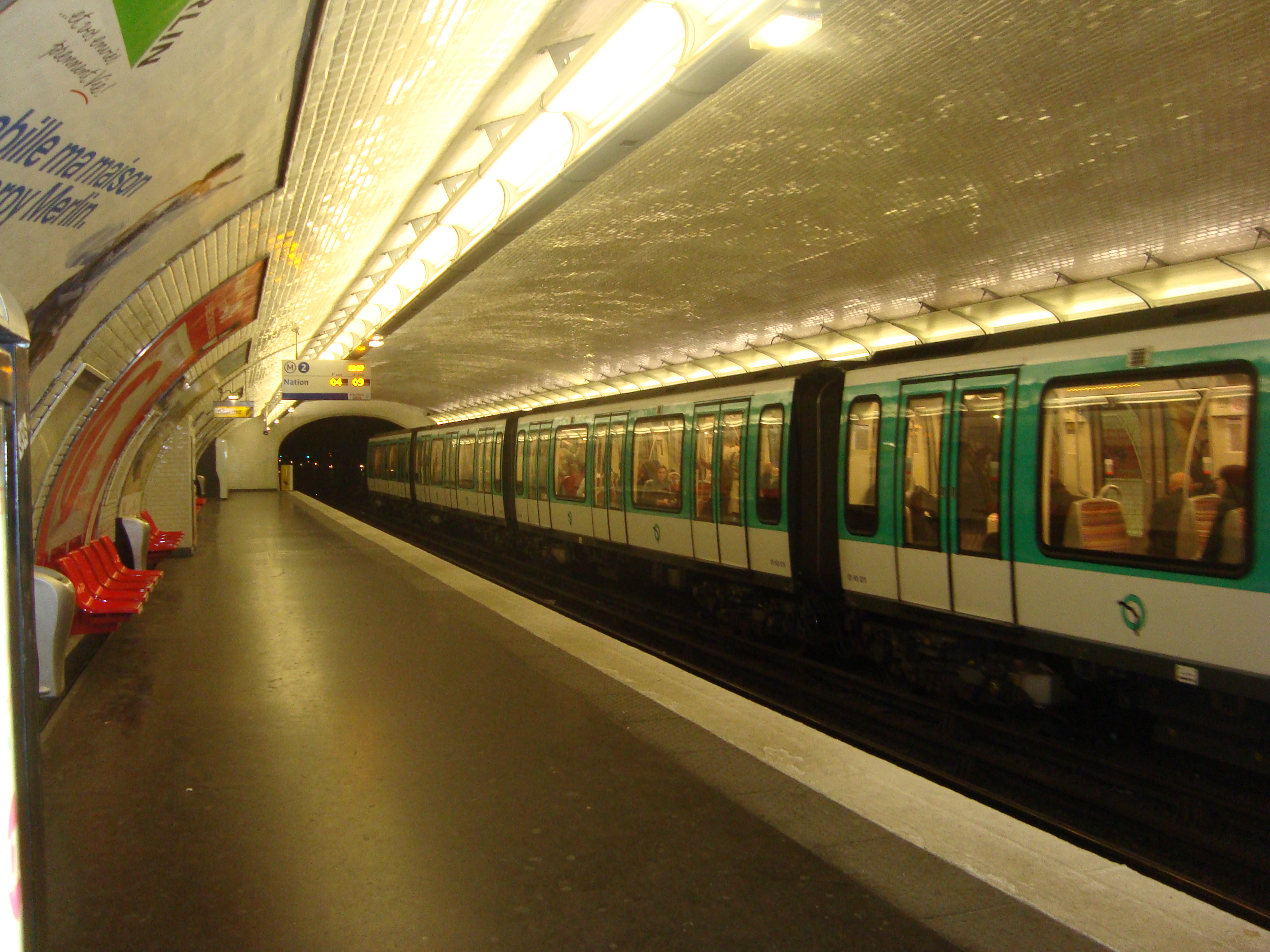 Rame à l'arrêt à la station Couronnes